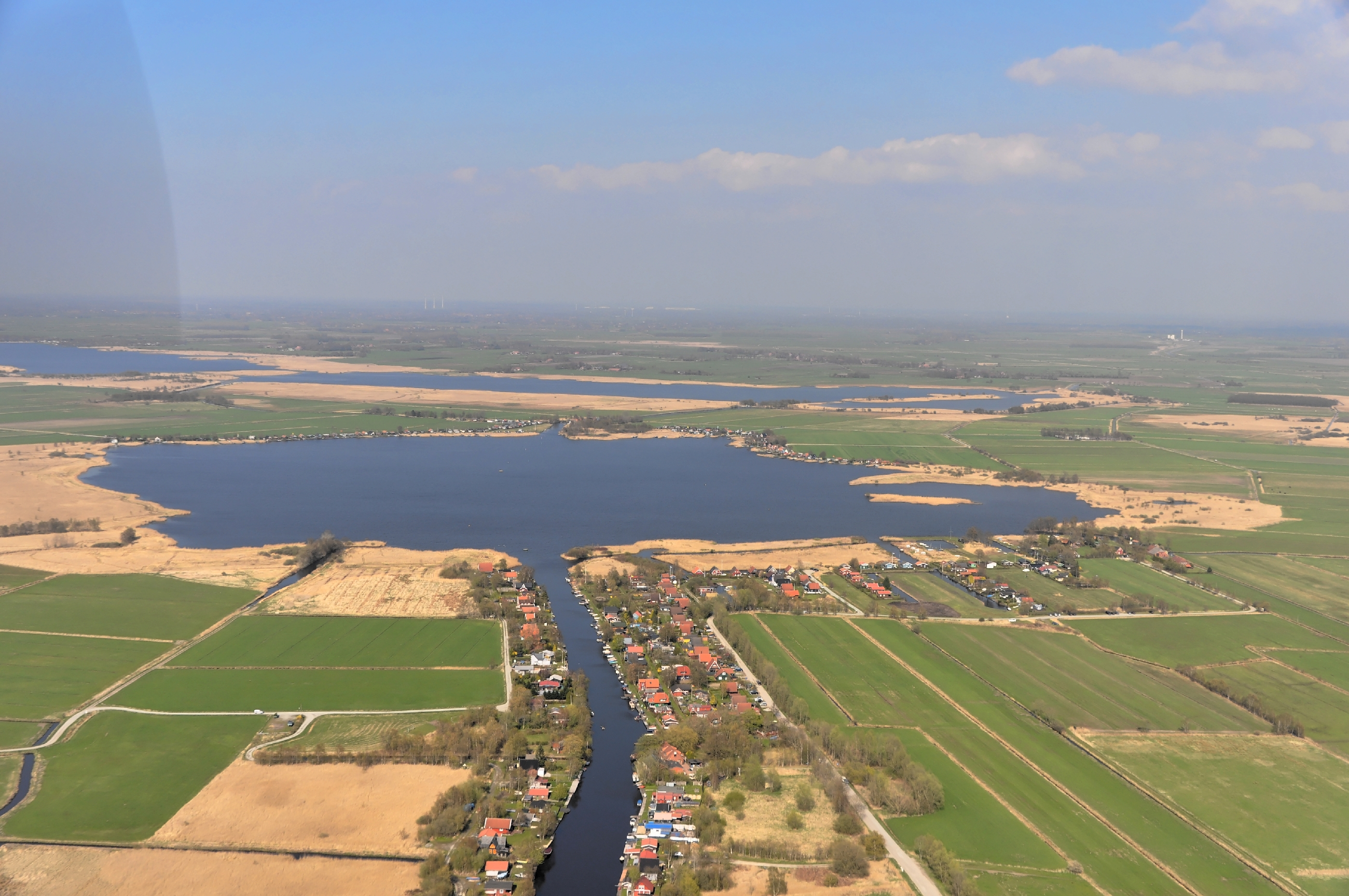 Luftbilder von der Nordseeküste 2013-05